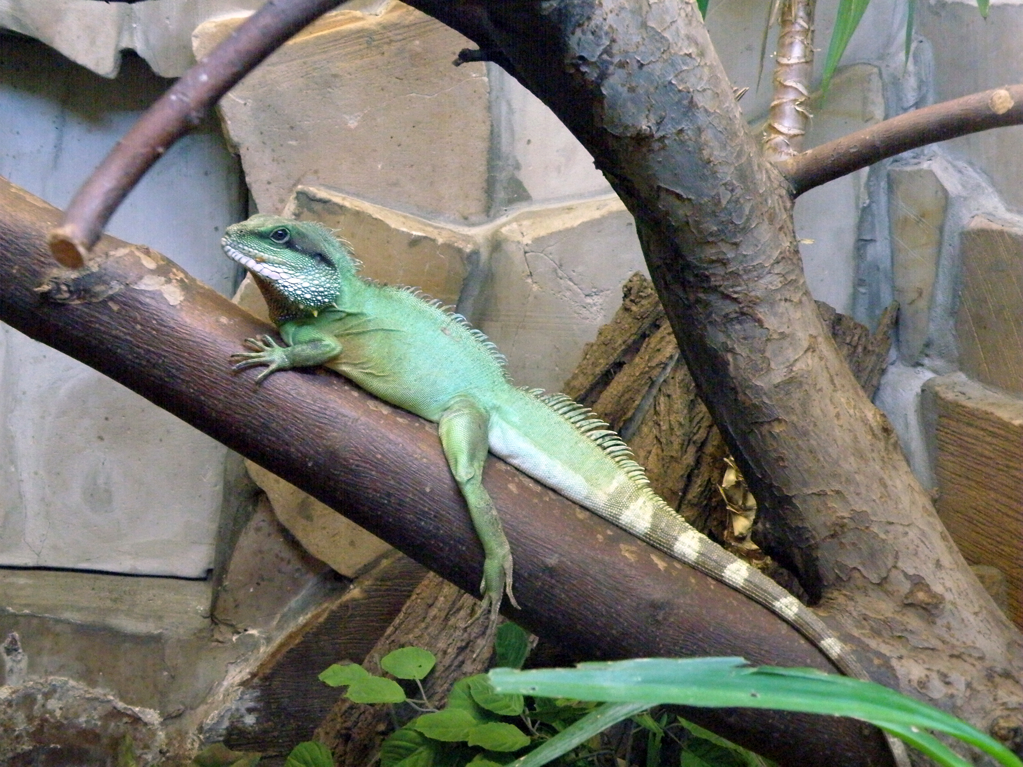 Agama błotna, wodnogama indochińska (Physignathus cocincinus) - Ogród Zoologiczny w Warszawie